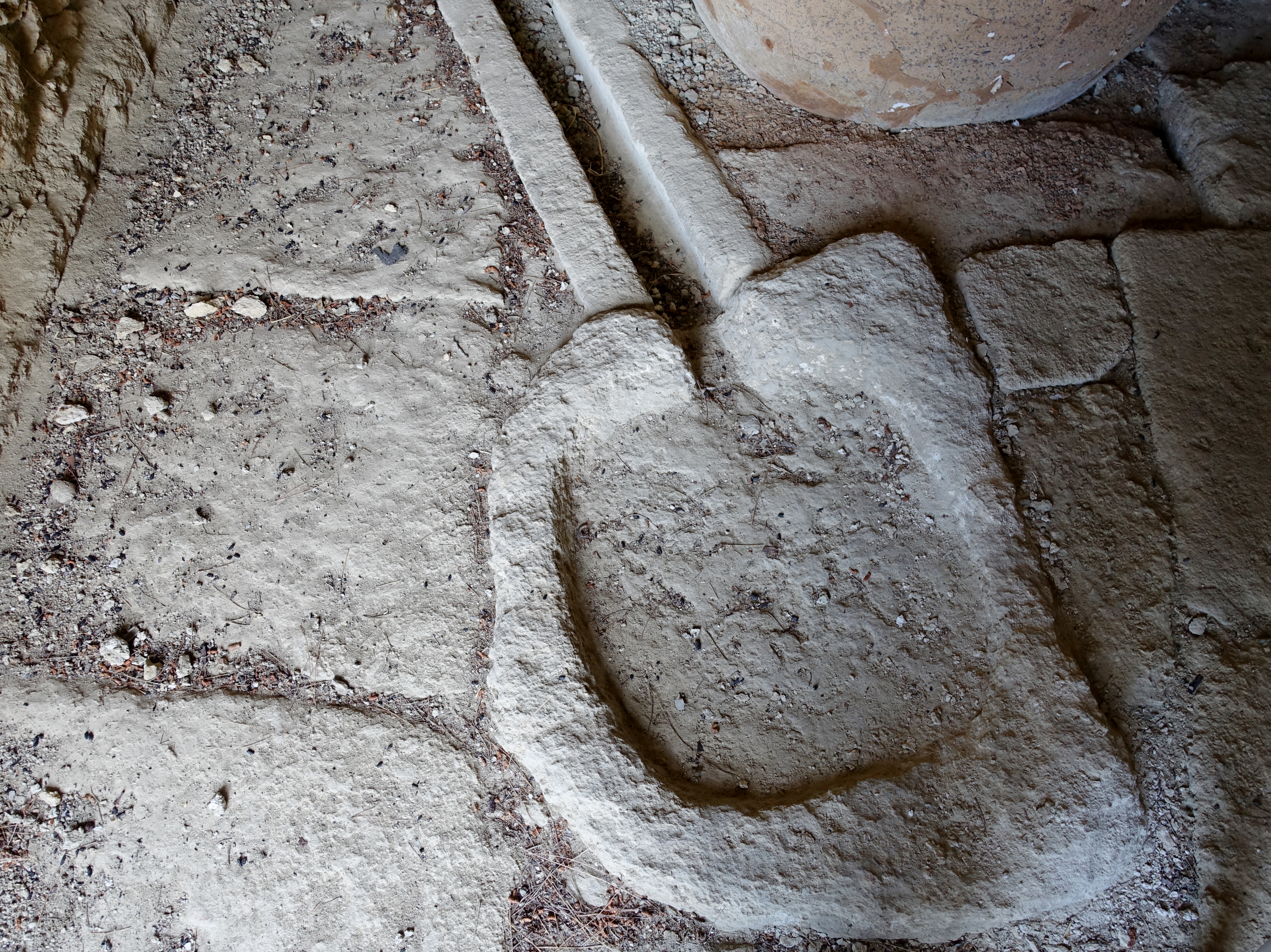 Weinpresse der „Villa“ von Vathypetro (Βαθύπετρο), Gemeinde Archanes-Asterousia, Kreta, Griechenland